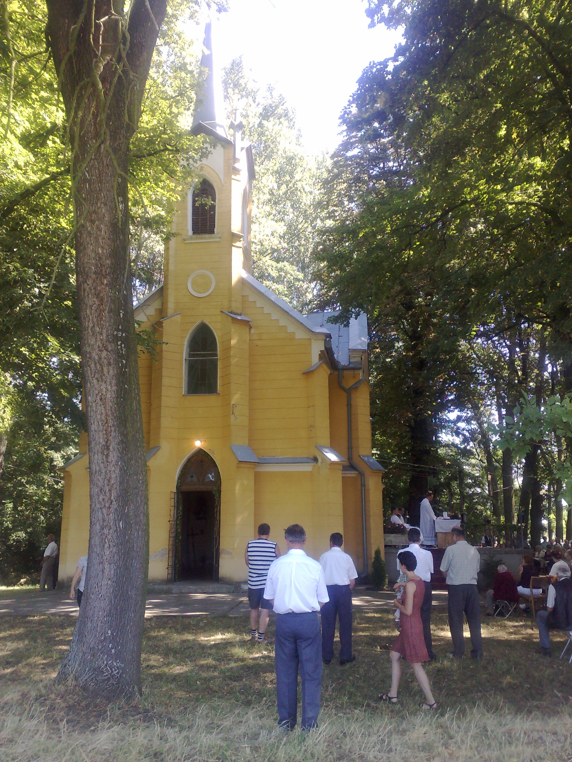 Szent Anna-kápolna Szany határában